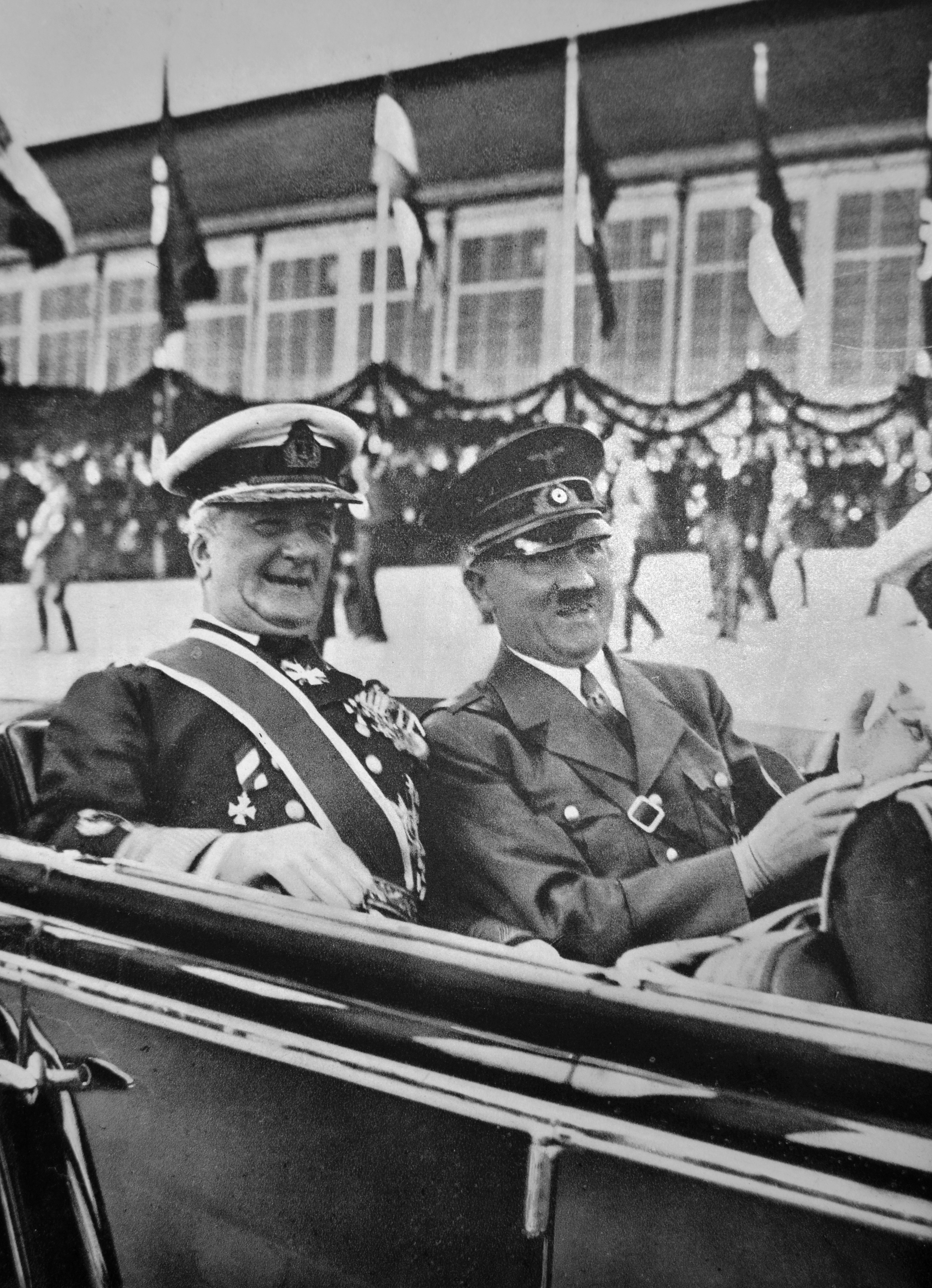 Miklós Horthy s Adolfom Hitlerom (1938)